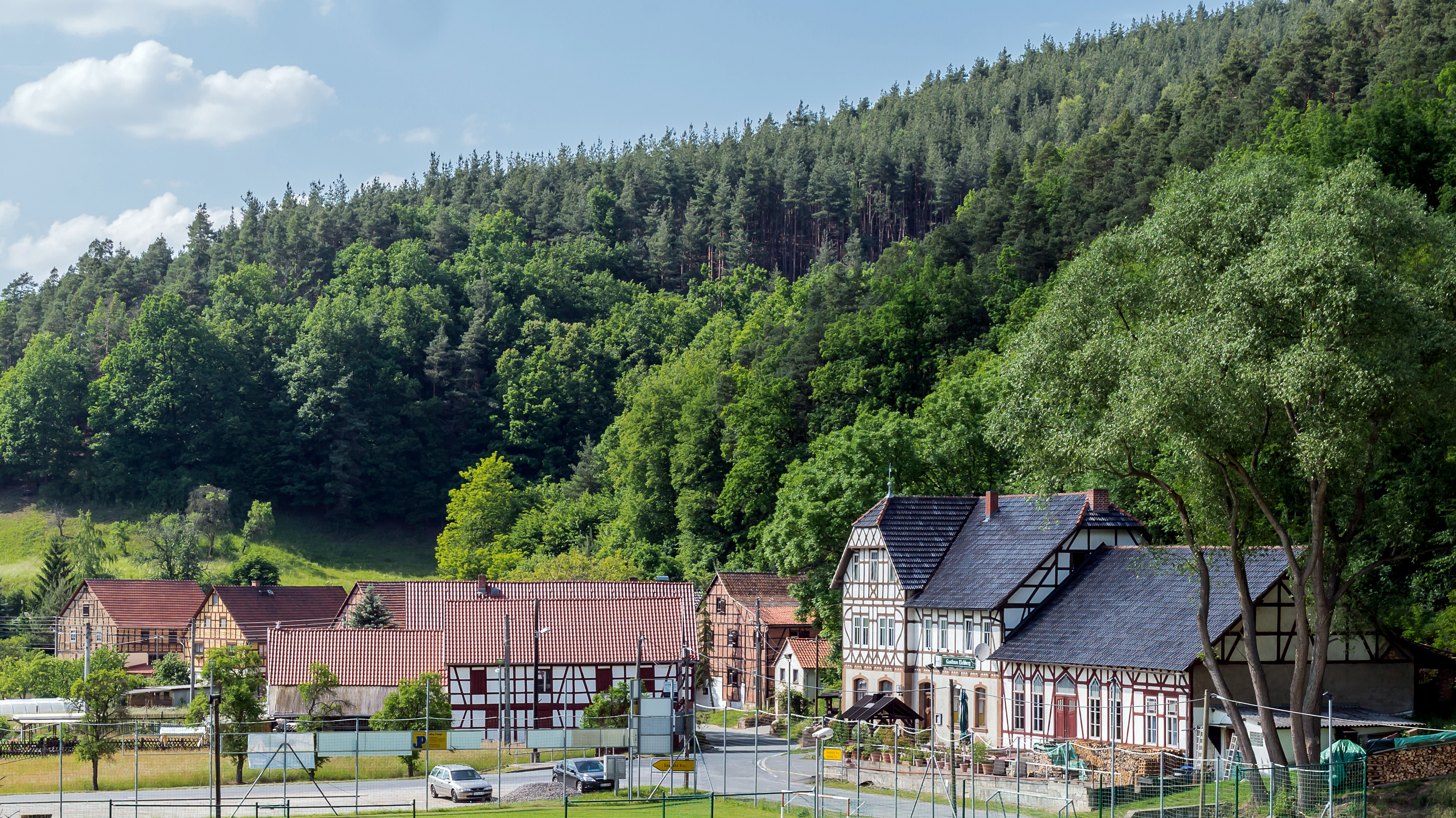 Denkmalensemble Hofanlagen Langenschade Hausnummern 40-45,Gemeinde Unterwellenborn